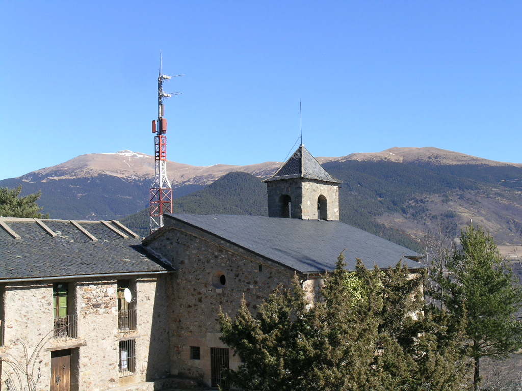 Serra de la Canya (Entre el Puig Cerverís i el Balandrau). Des de l'Ermita de Sant Antoni (Ribes de Freser)